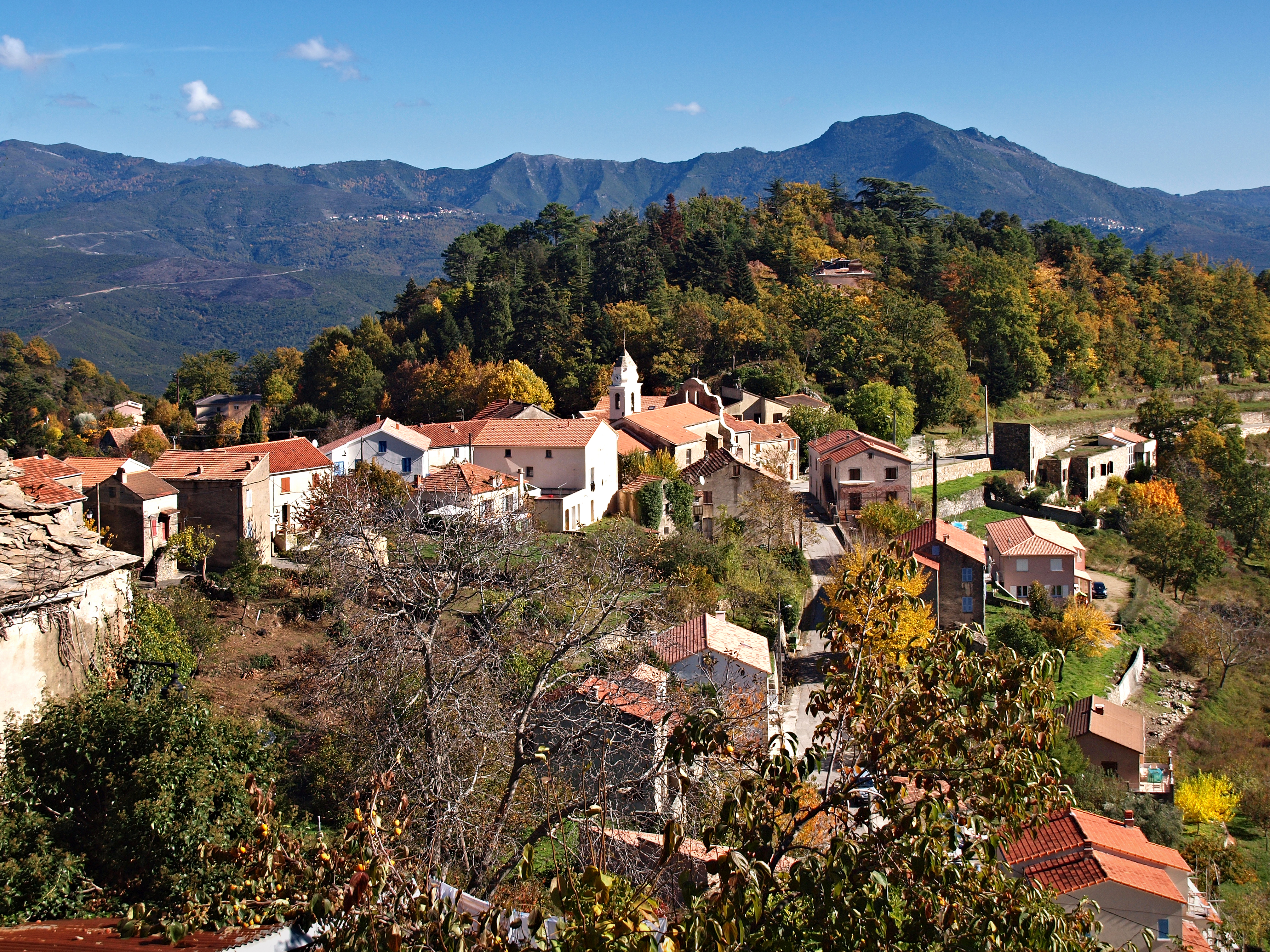 Santo-Pietro-di-Venaco (Corsica) - Vue du village. En arrière-plan les villages d'Erbajolo (à gauche) et d'Altiani (à droite) dans la Rogna.